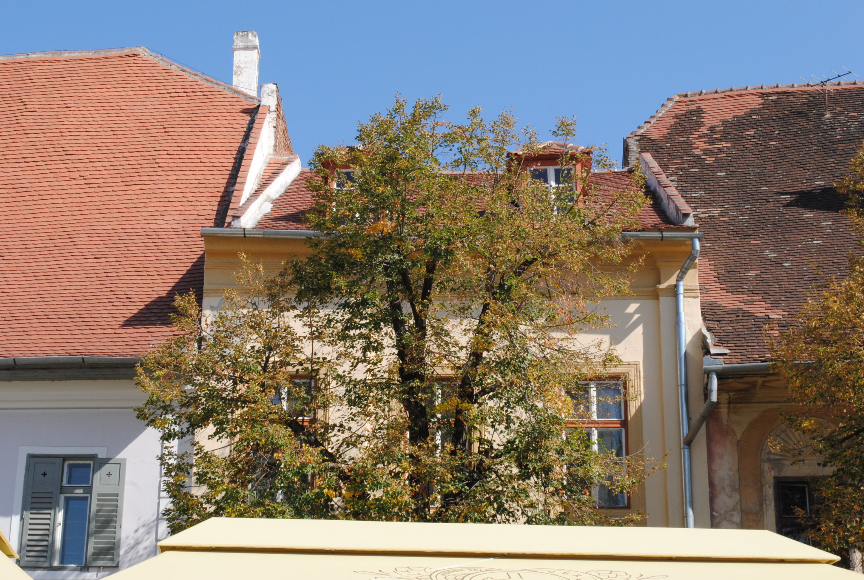 Casă (în curte fragment din incinta II), sec. XV - XVI,1901 (restructurări)